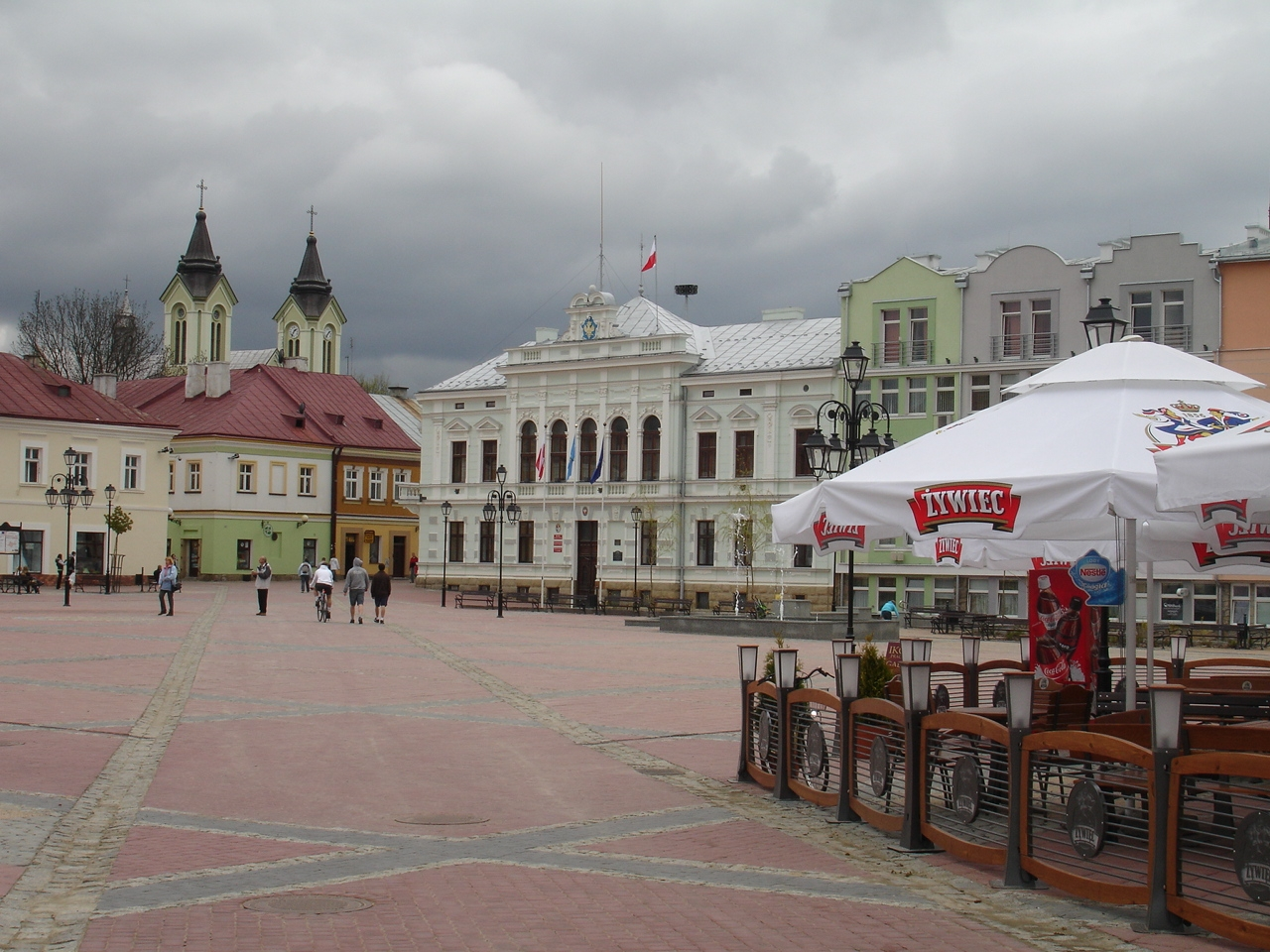 sanok - main market. Market Square in Sanok